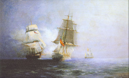 Buque de guerra chileno atacando a uno español durante la independencia.